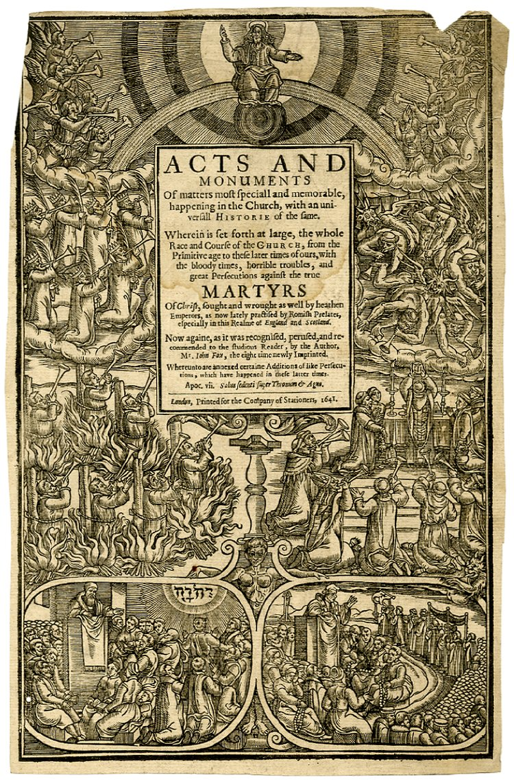 Frontispicio de John Foxe, Acts and Monuments, Londres, 1641. British Museum